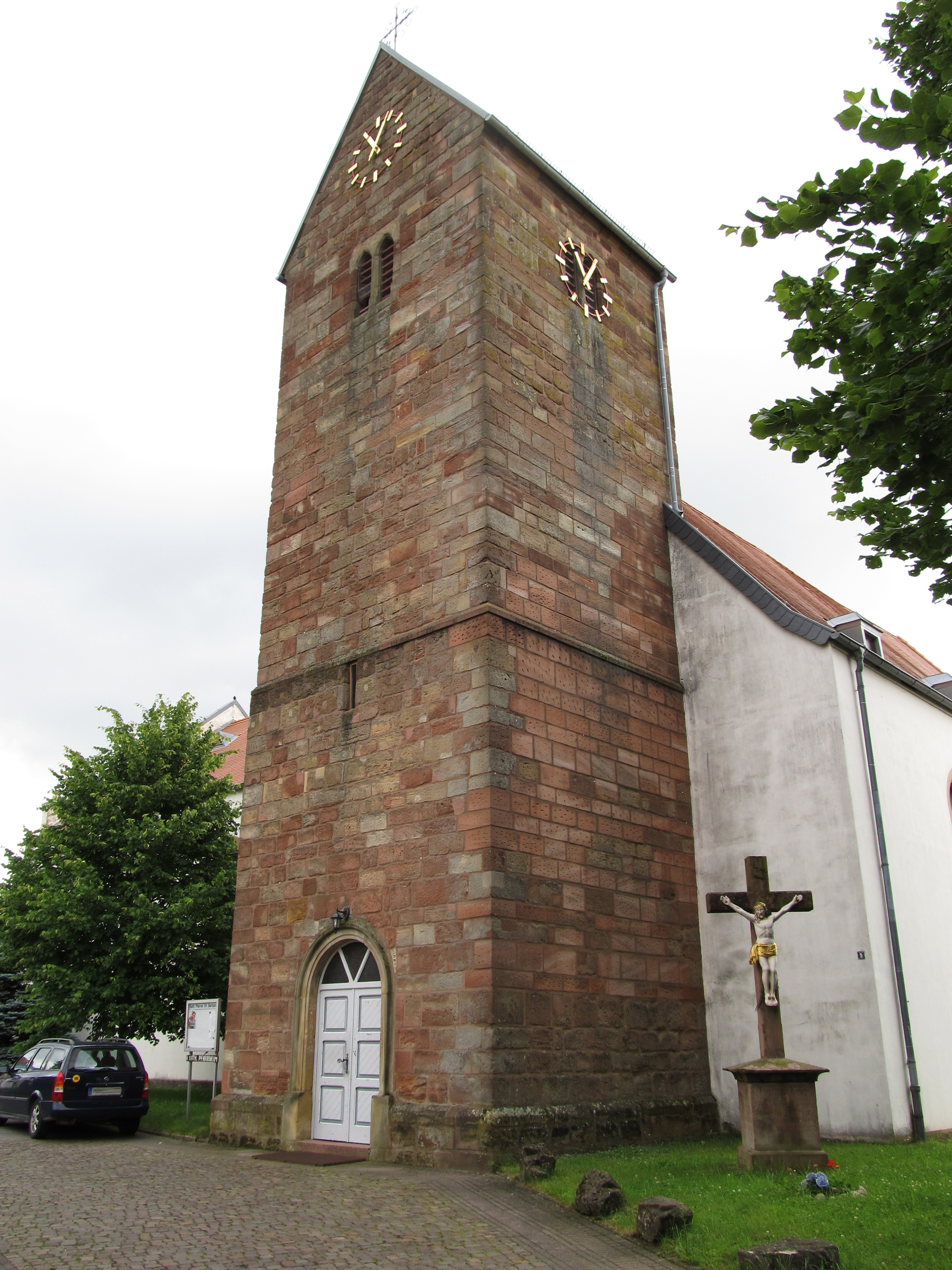 Turm der katholischen Pfarrkirche St. Barbara in Blickweiler, Saarland